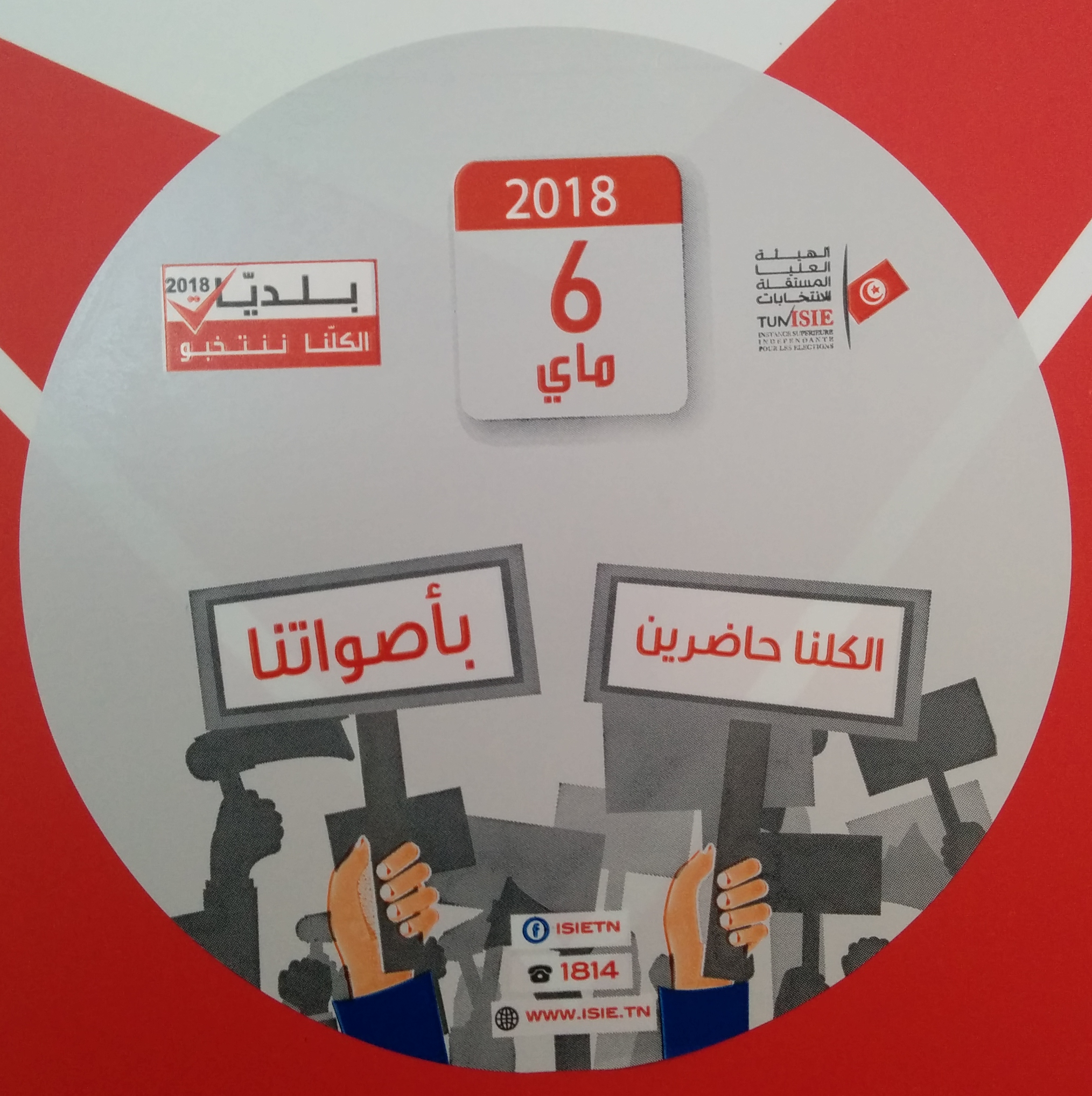 Autocollant distribué par l'Instance Supérieure Indépendante pour les Élections (ISIE) en Tunisie, pour inciter les électeurs à voter aux élections municipales du 06 mai 2018.